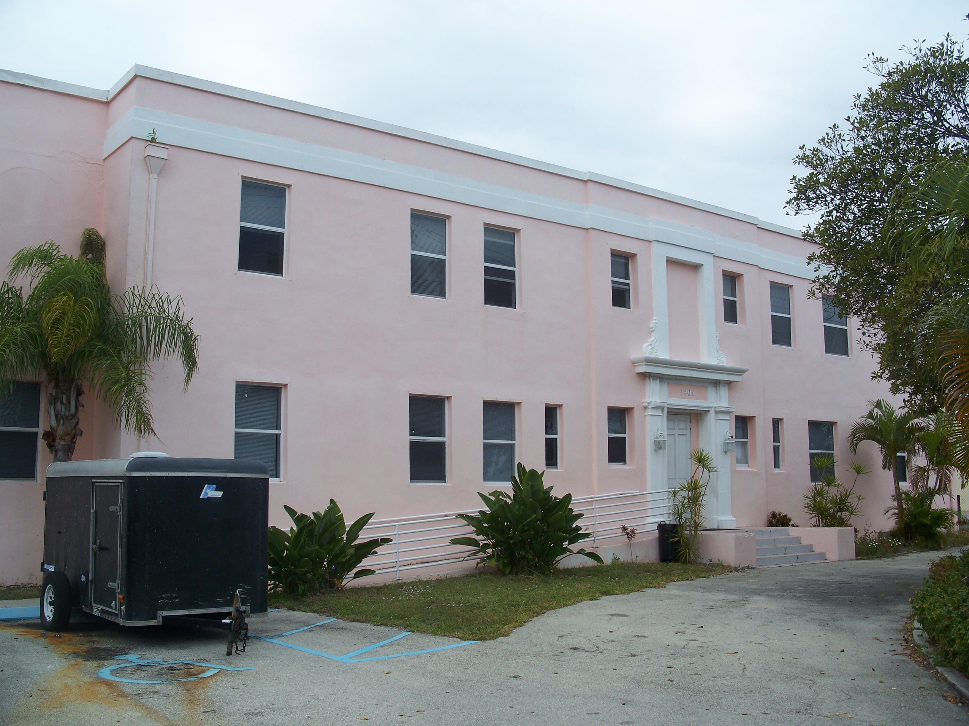 West Palm Beach, Florida: Pine Ridge Hospital